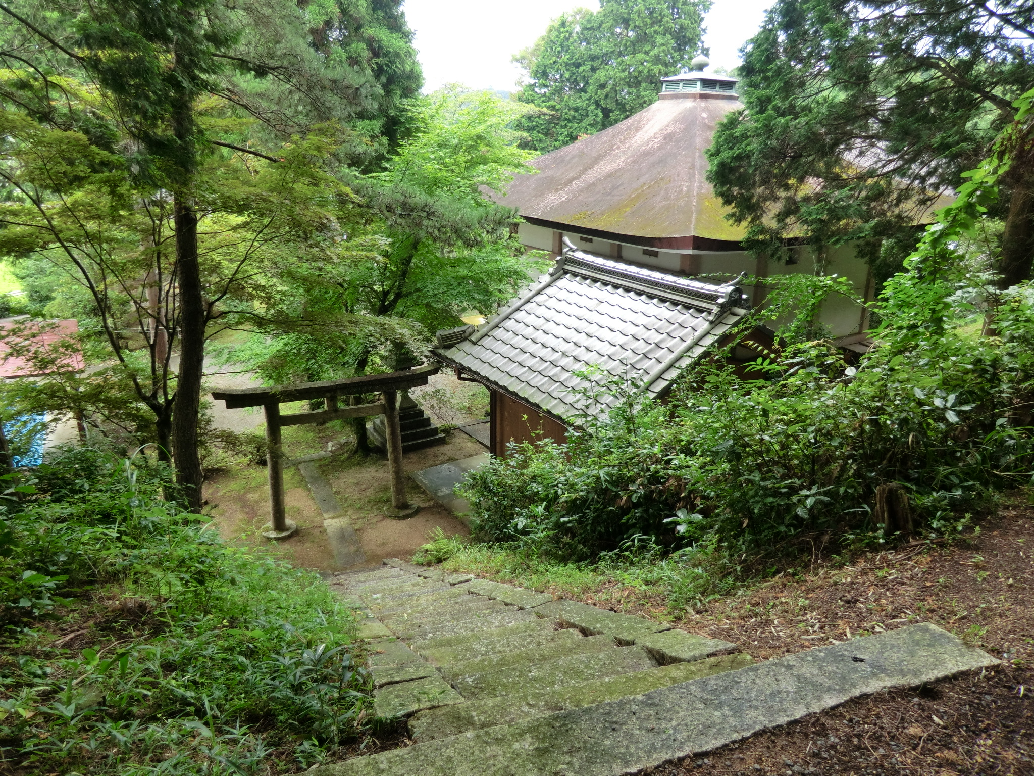 滋賀県甲賀市甲南町にある伊勢廻寺の全景